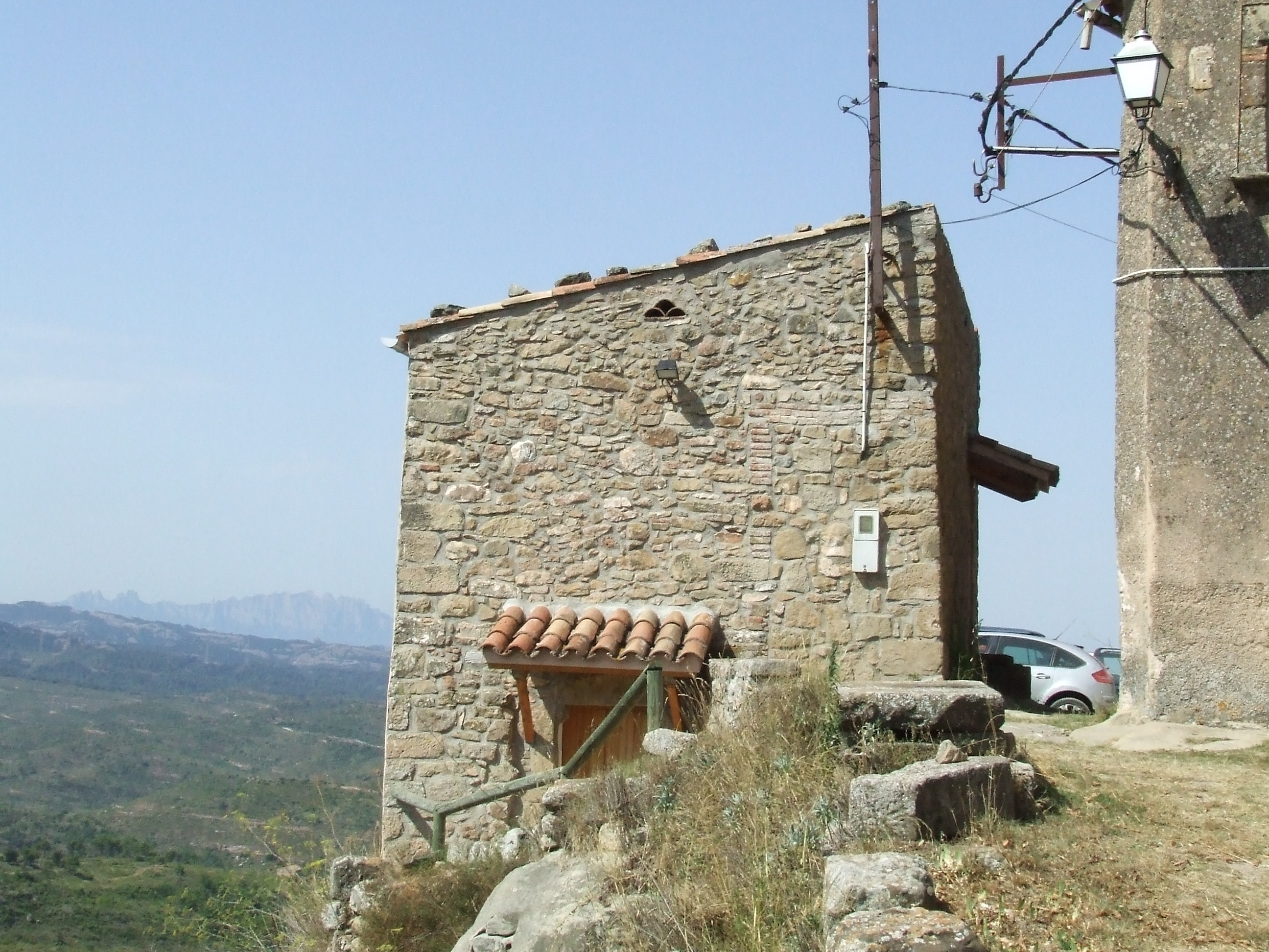 L'actual Casa de la Vila de Granera (Moianès)